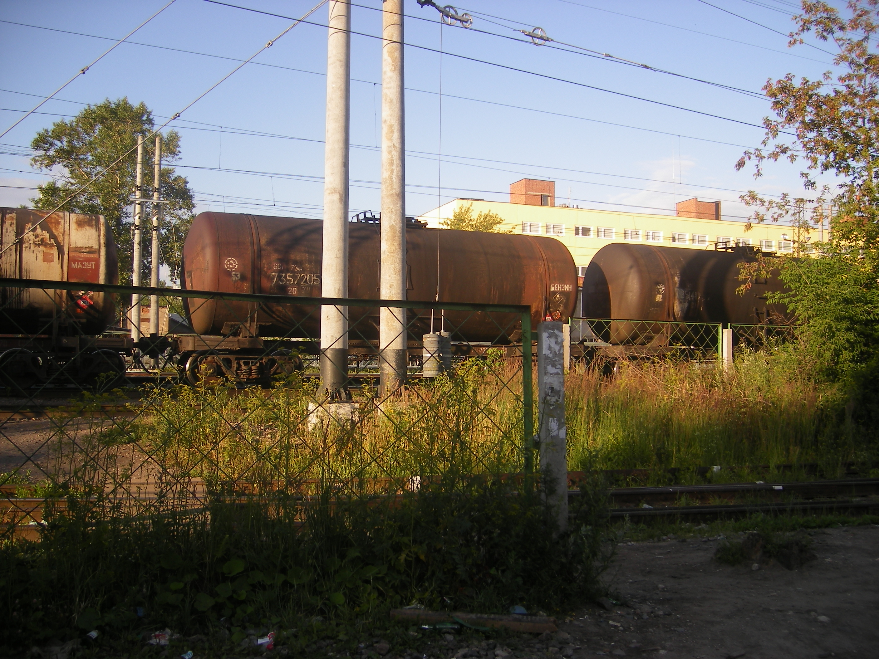 Солнечногорский ЖД оборот